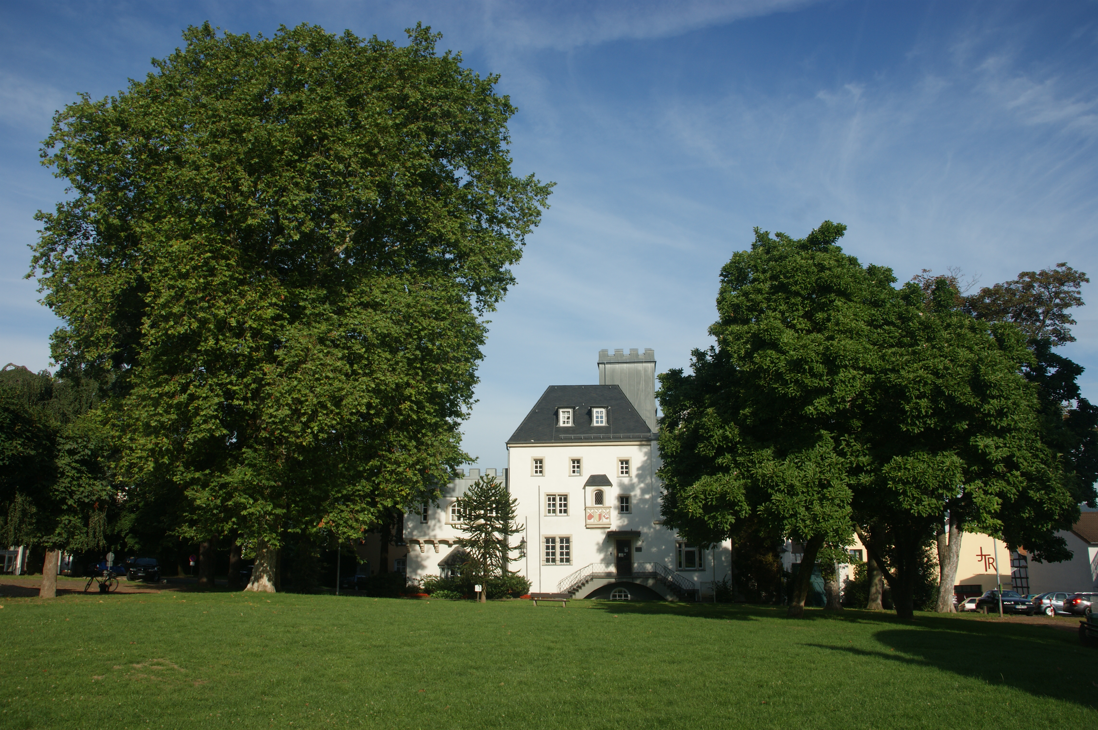 Obere Burg mit Parkanlage, Rheinbreitbach